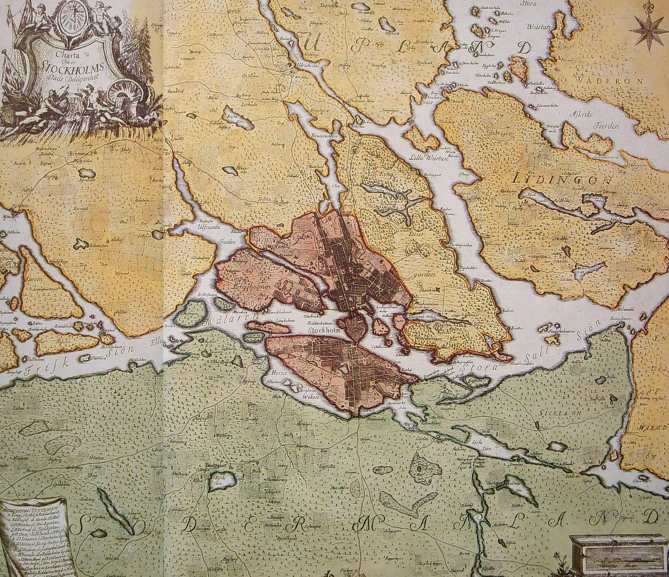 Charta Öfwer Stockholms Stads Belägenhet